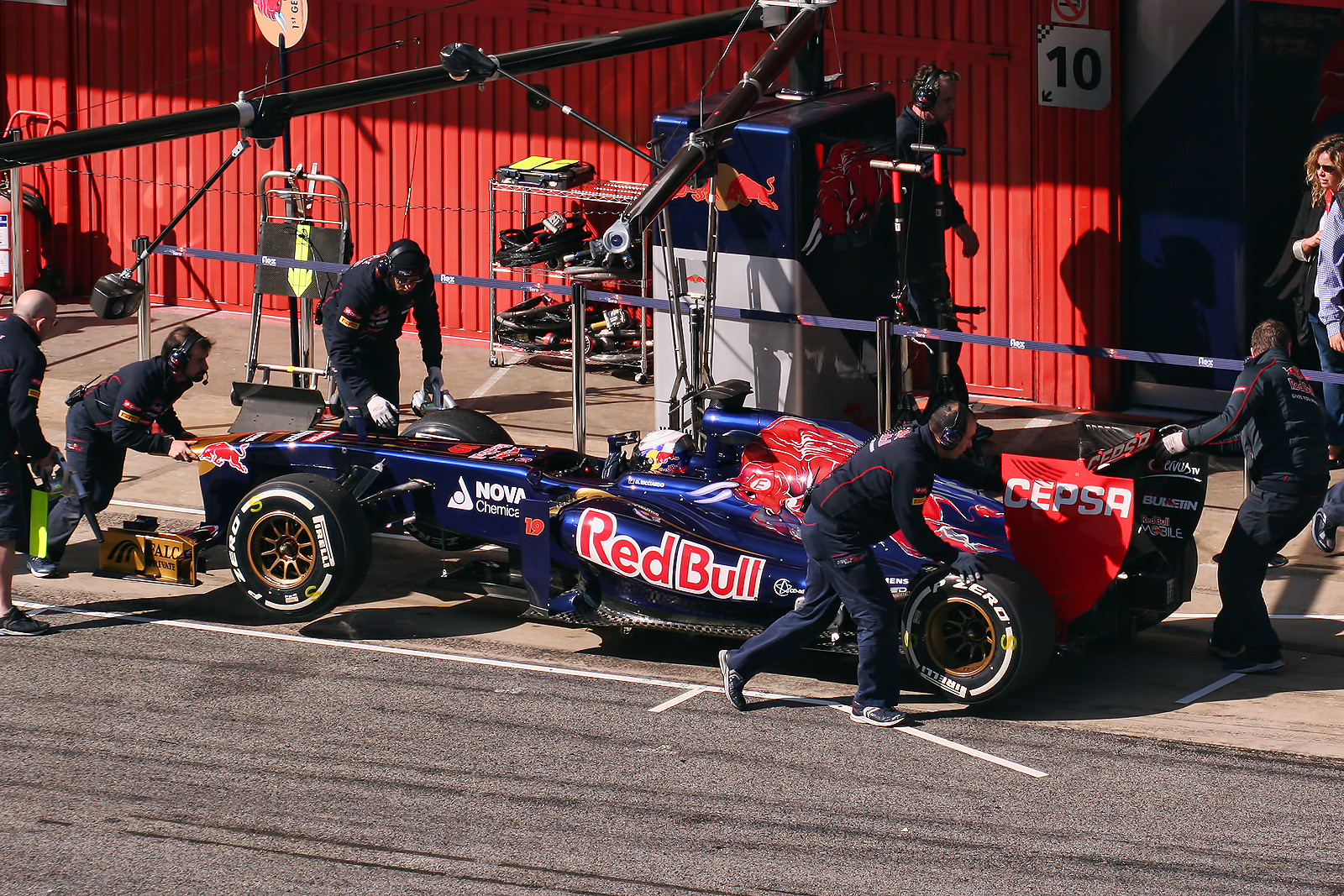 F1 Tests - Circuit de Catalunya, Spain.